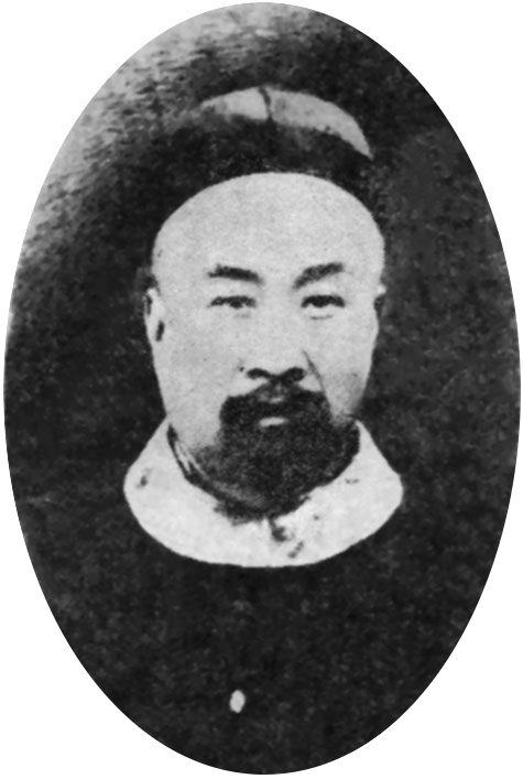 王懿荣（1845年－1900年），字正儒，号廉生，晚清翰林，政治人物，金石学家。山东福山（烟台福山区）人。